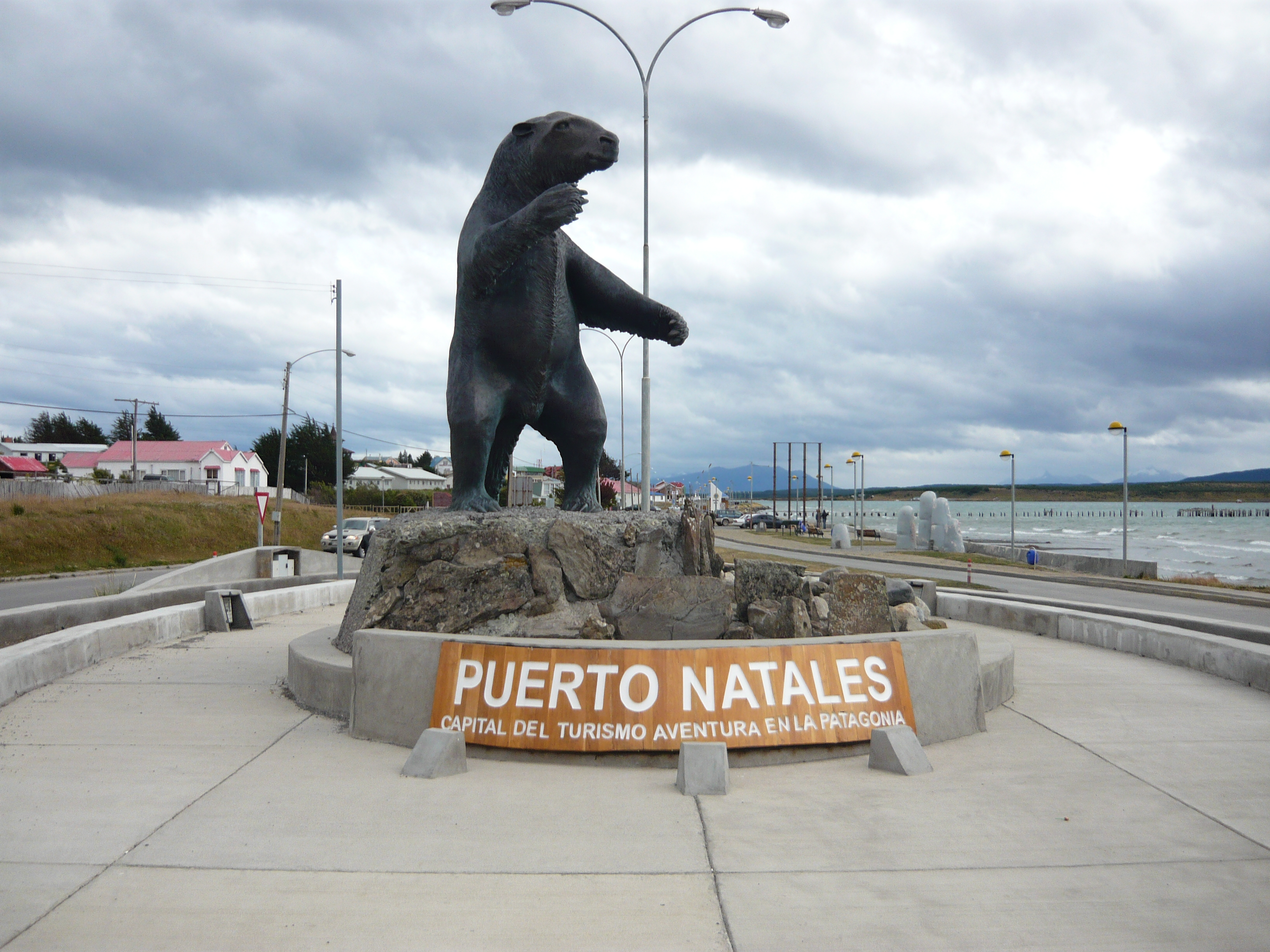 Escultura de un Mylodon en la entrada al pueblo de Puerto Natales